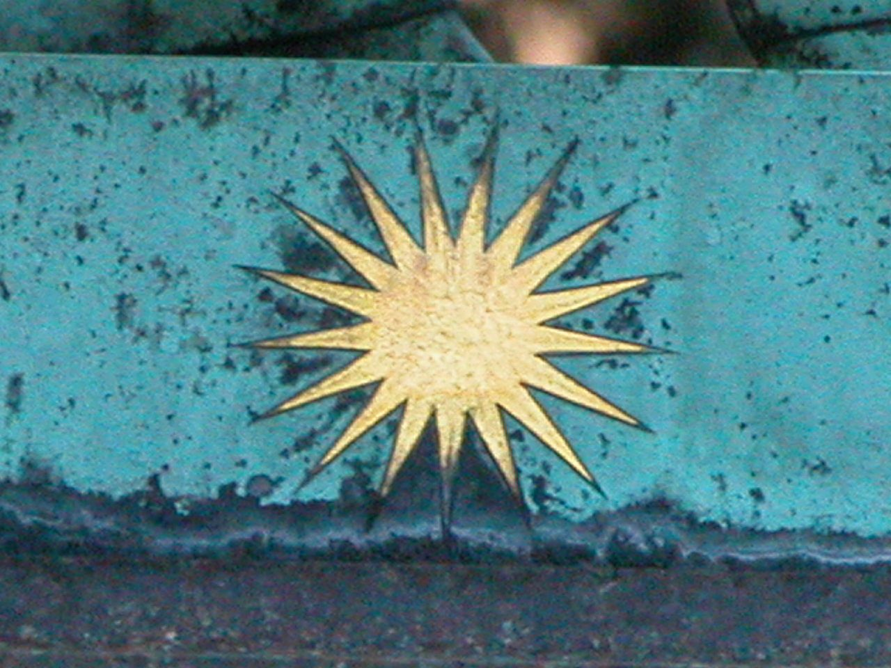 Braunschweig: Gauß-Denkmal mit 17-eckigem Stern 3